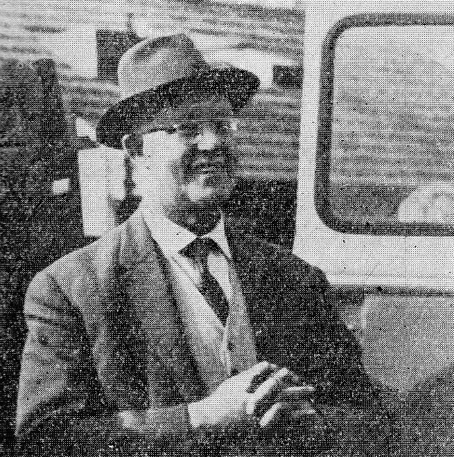 Jan Pieter Bakker - holenderski geograf i geolog.